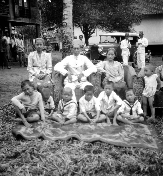 Negatief. Het dorpshoofd van Moeara Beliti, Pasemah, Zuid-Sumatra, met zijn gezin